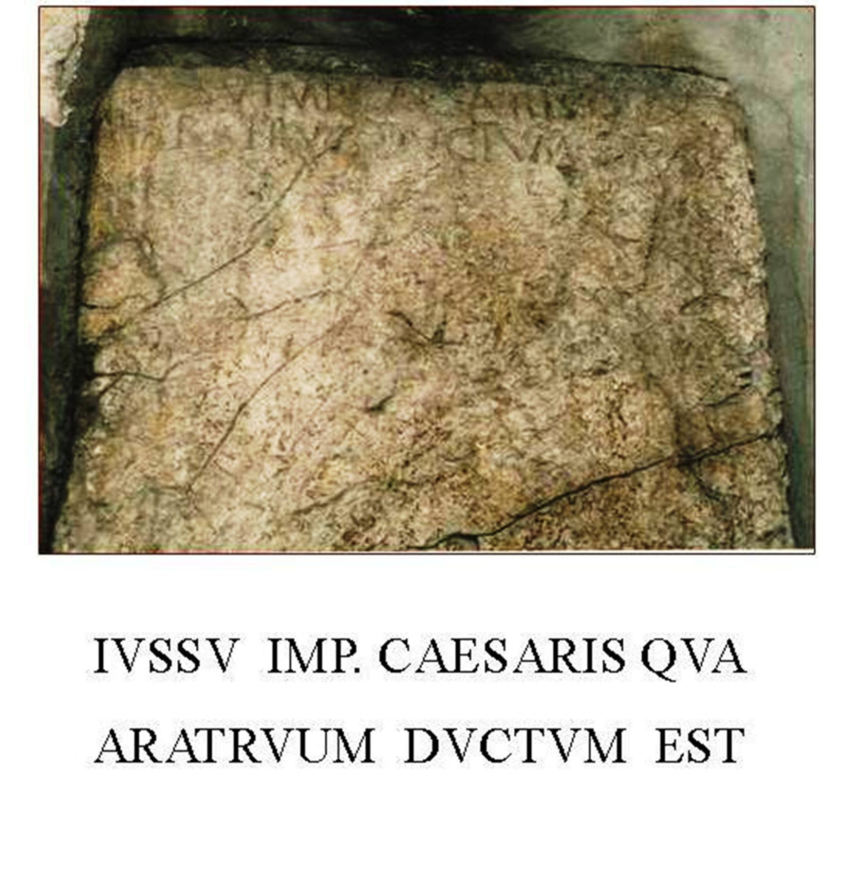 Epigrafe di Cesare Augusto conservata sulla facciata del Palazzo Messore a Marcianise. La stessa iscrizione si trova anche a Capua e Terracina.